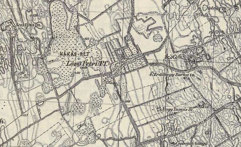 Történelem